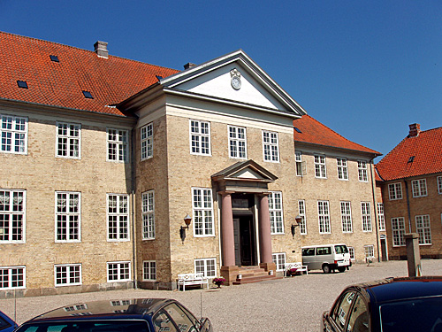 Skjoldenæsholm er en hovedgård i Valsølille Sogn, Ringsted Kommune , Denmark